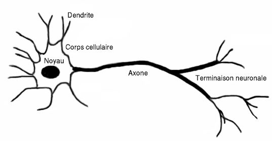 description Schéma d'un neurone.